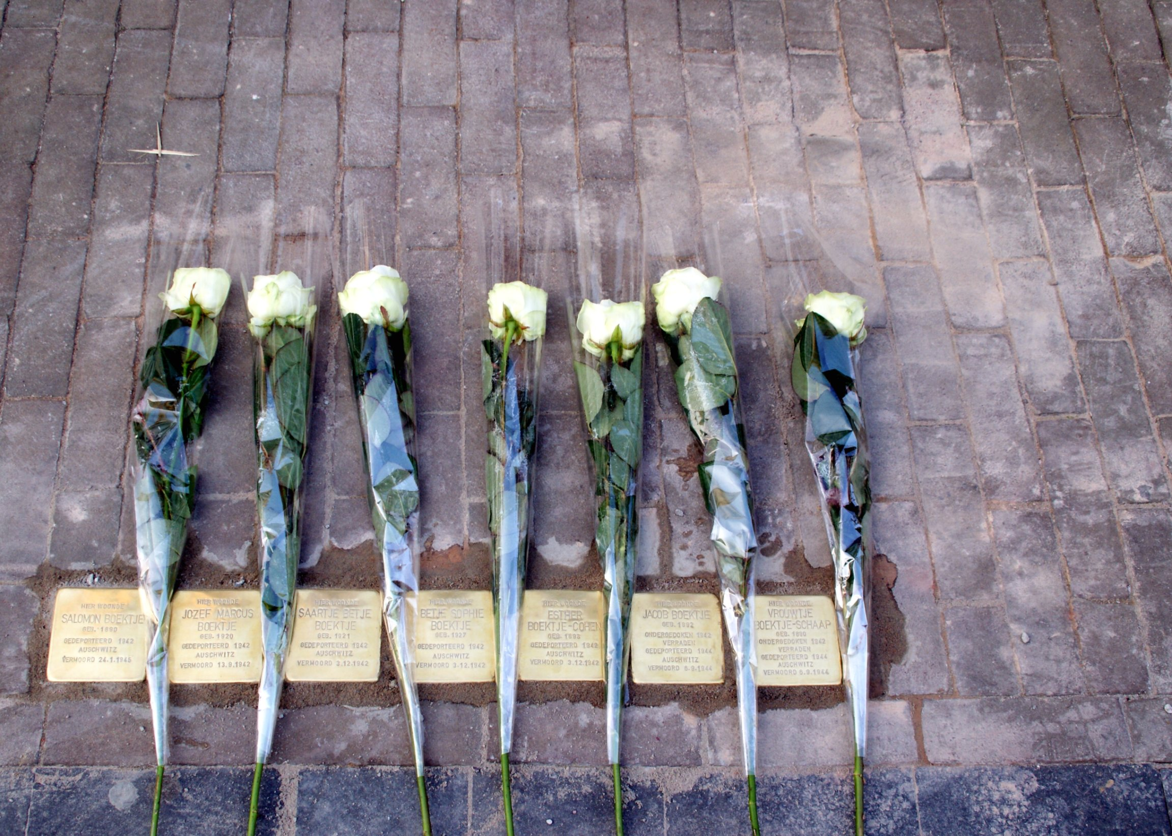 Struikelstenen voor zeven leden van de familie Boektje in Kampen/The Netherlands